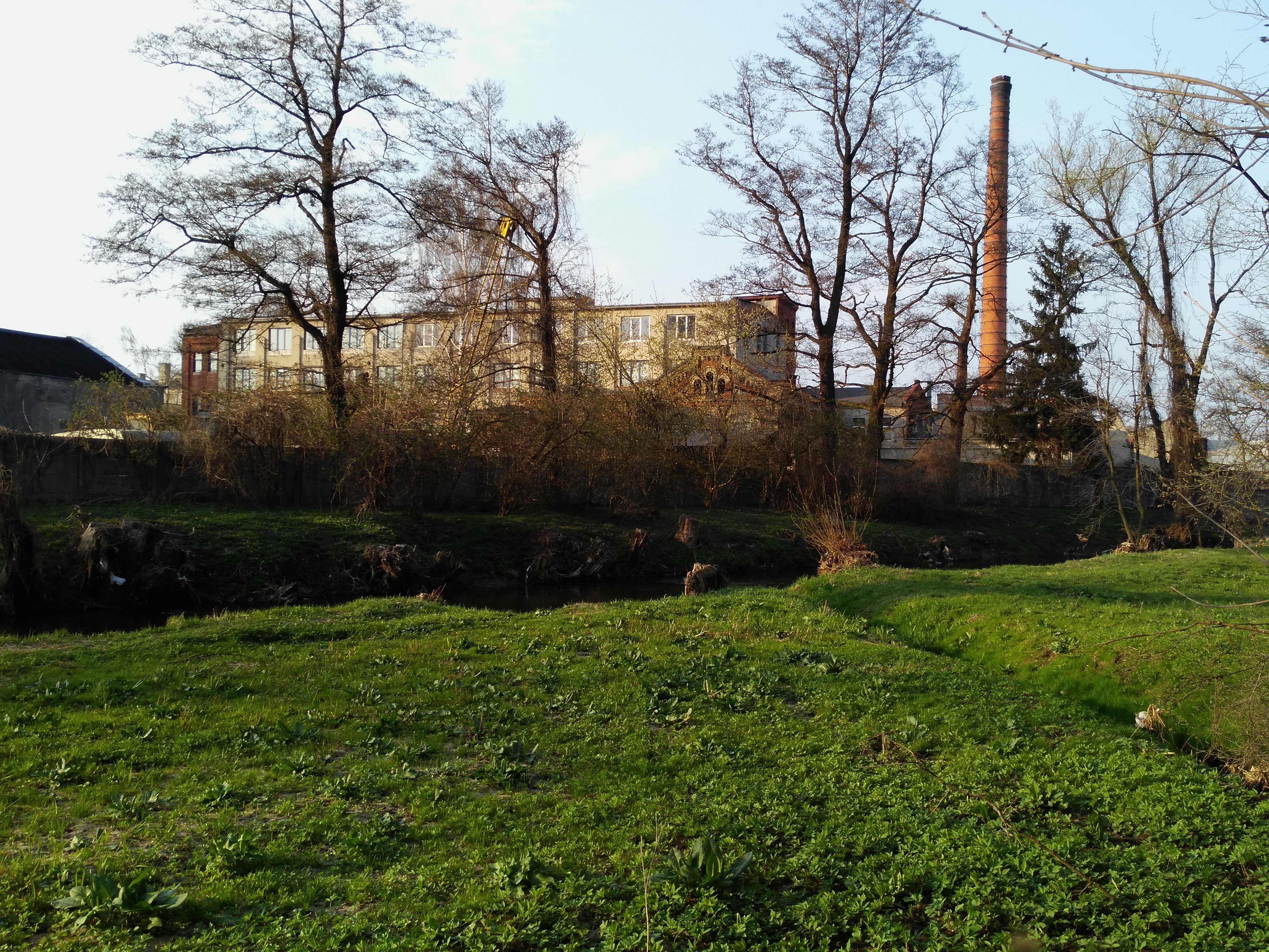 Jedna z fabryk Landsberga. Widok znad Wolbórki